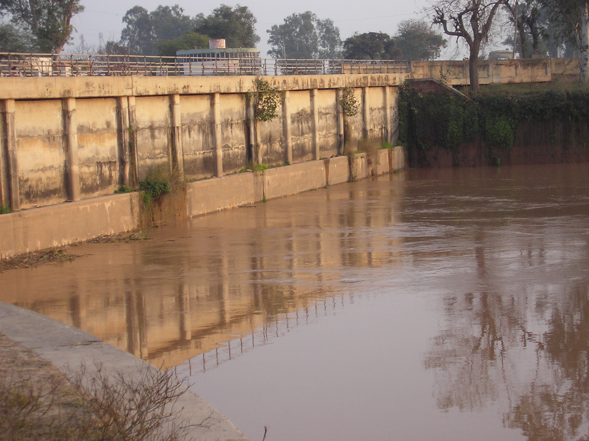 El rio Ghaggar en Punjab